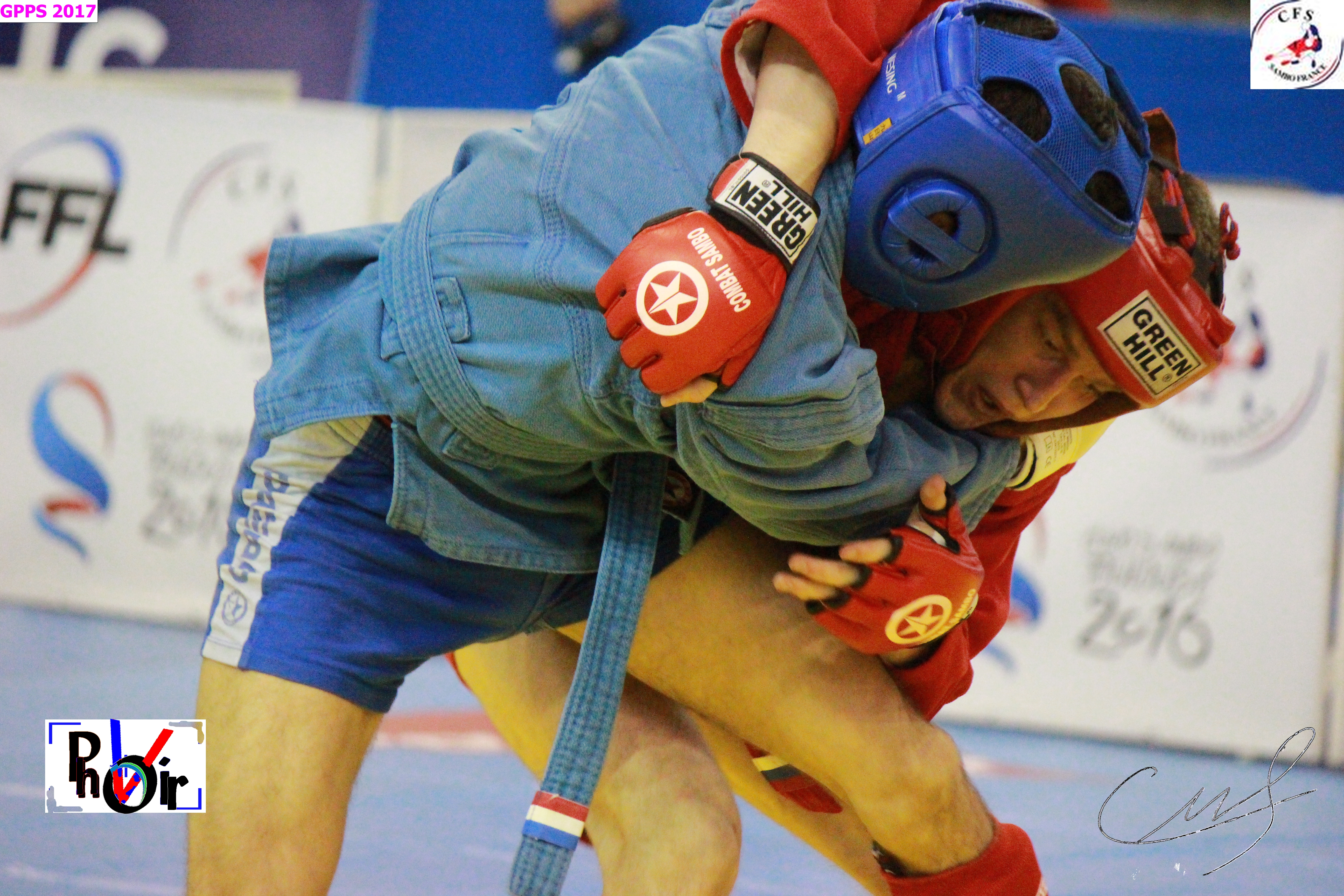 5 - Grand Prix Paris de Sambo (GPPS) 2017 Grand Prix Paris de Sambo 2017.